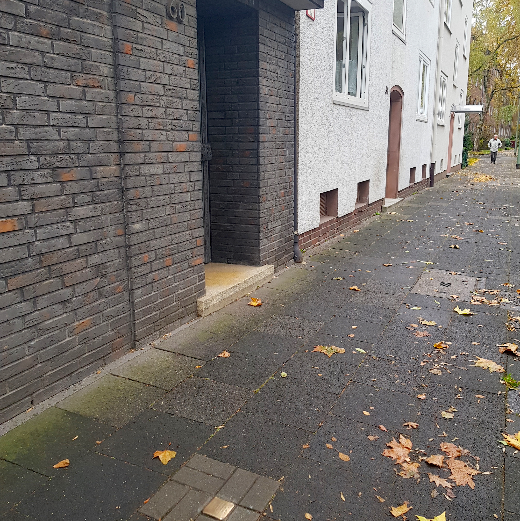 Stolperstein für Wilhelm Sandhövel an der Königsberger Alle 60, 47058 Duisburg